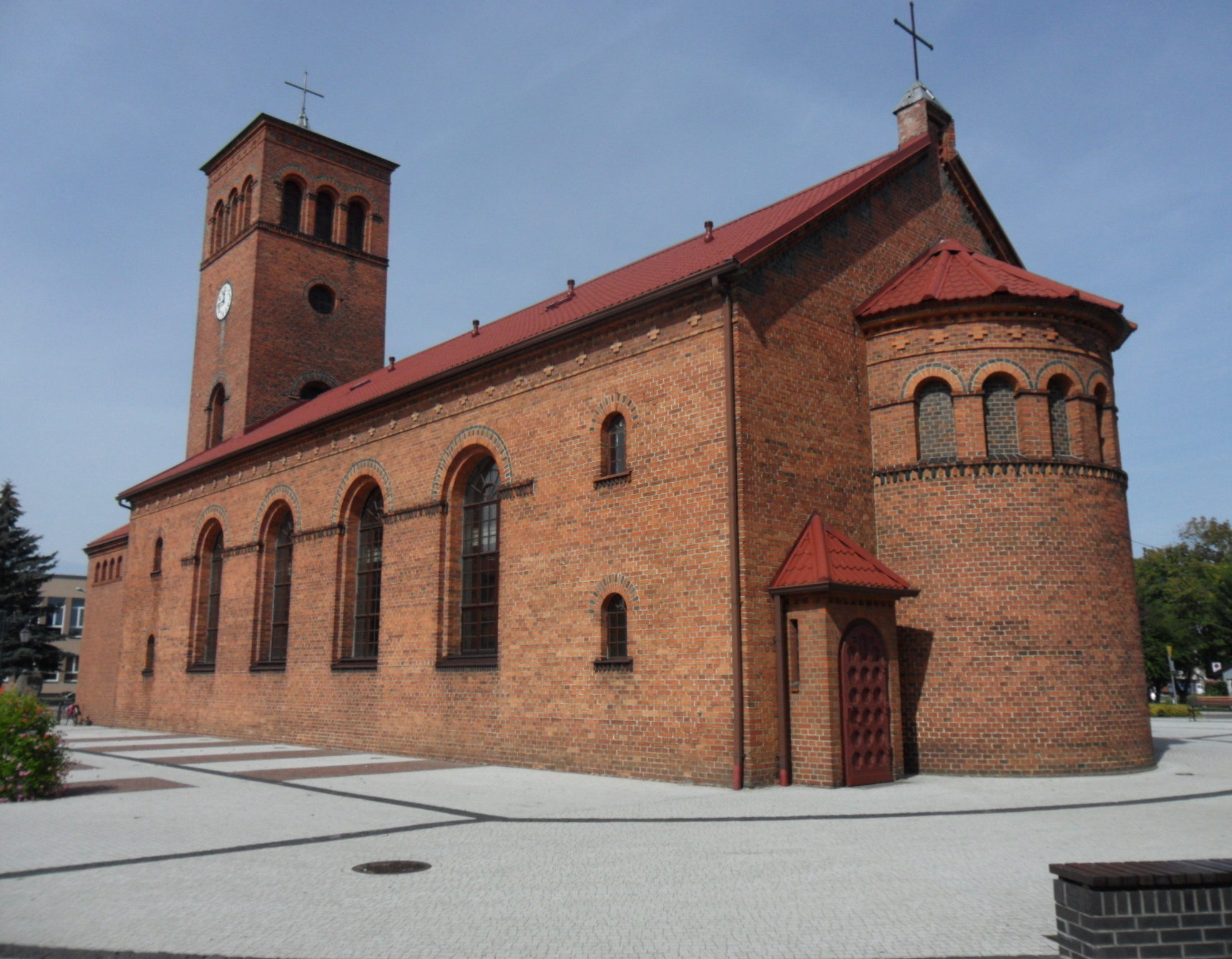 Krajenka, kościół par. p.w. śś. Mikołaja i Anny, 1744, 1837, 1882, l. 70. XX